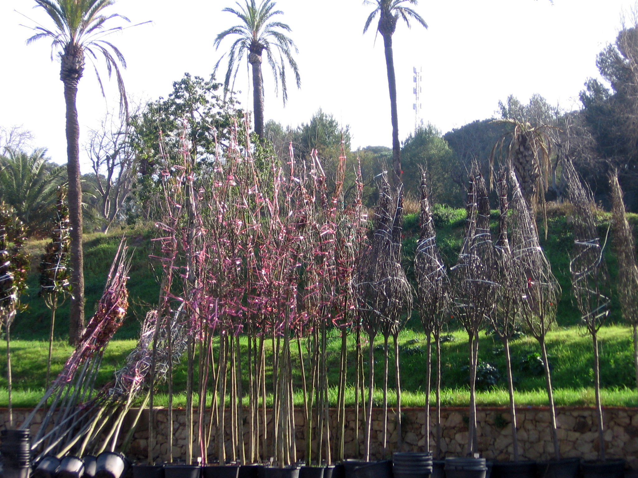 Vivero de Tres Pins.